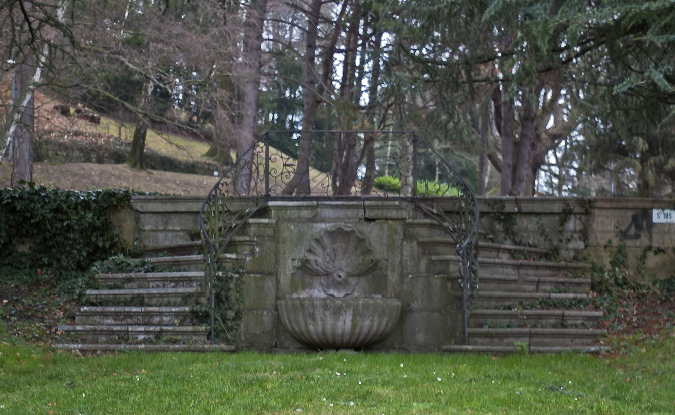 In dem Kurpark der Stadt Aachen befindet sich hinter das neue Kurhaus die tranzlozierte (übertragene) Treppenanlage nach Entwurf von Johann Joseph Couven. Es ist die Rokoko-Treppenanlage aus dem Garten der Familie Guaita in der Rosstraße. Jakob Couven dürfte sie um 1780 entworfen haben. Ein kunstvoll geschmiedete Ziergitter steht mit der zweiläufigen Treppe, die ein Brünnlein rahmt. Ein gelungenes Ensemble seiner Zeit. Die Gitterbekrönung mit den Initialen des Corneille von Guaita kam in der Nachkriegszeit leider abhanden.